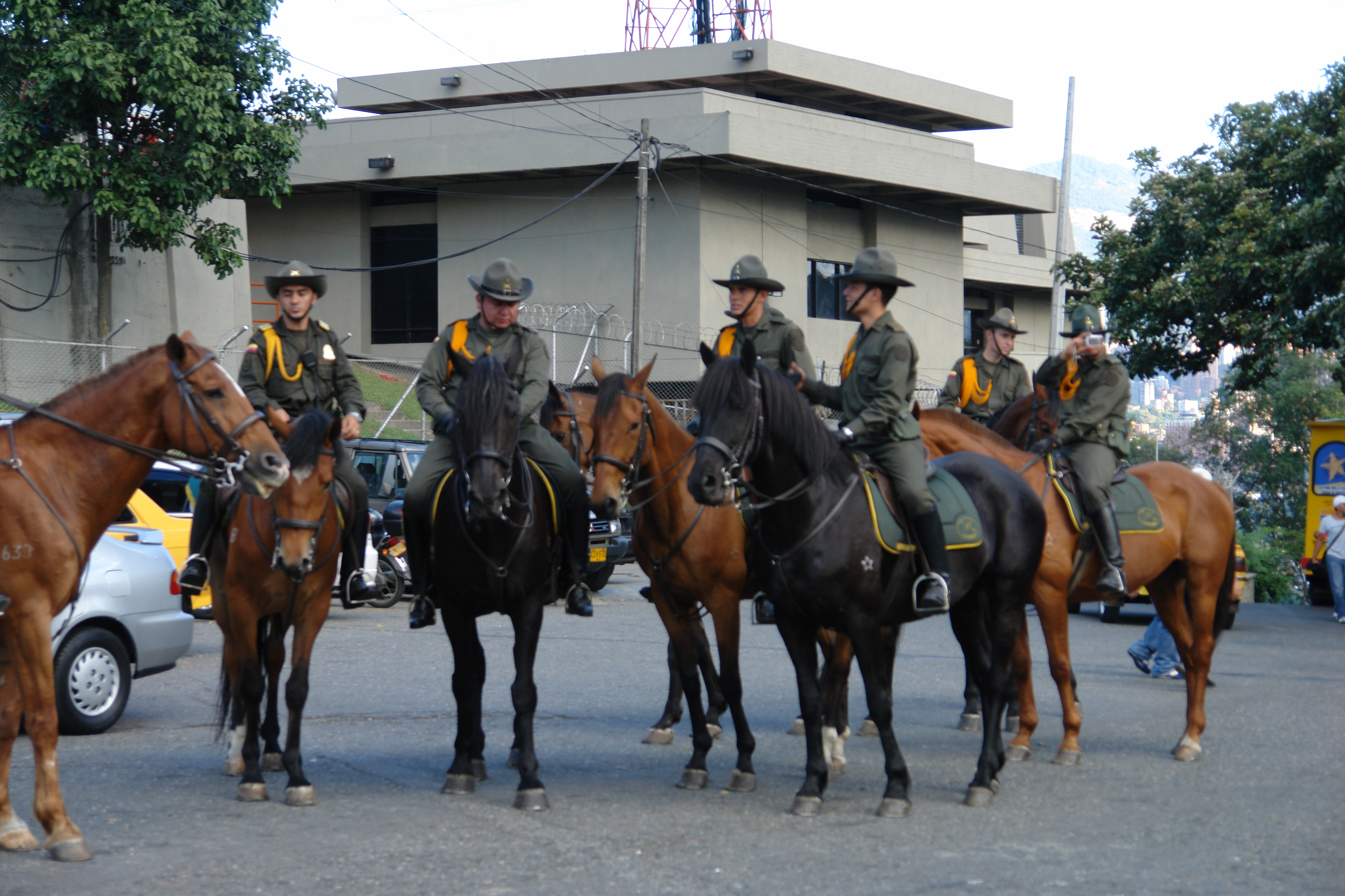 Carabineros en el Pueblito Paisa (Mounted police) es un policia.